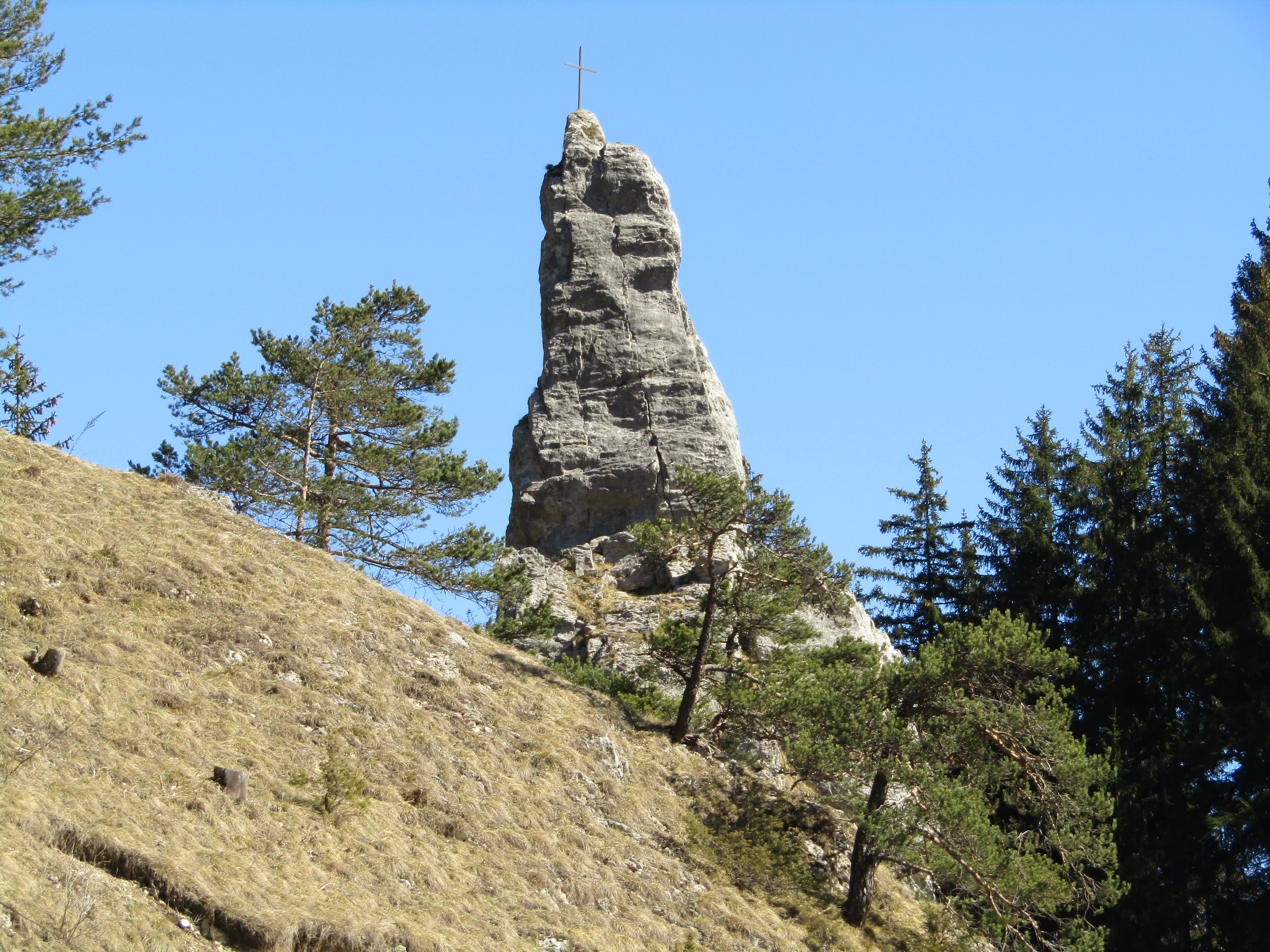 Aiguille de Villard-de-Lans en mars 2019